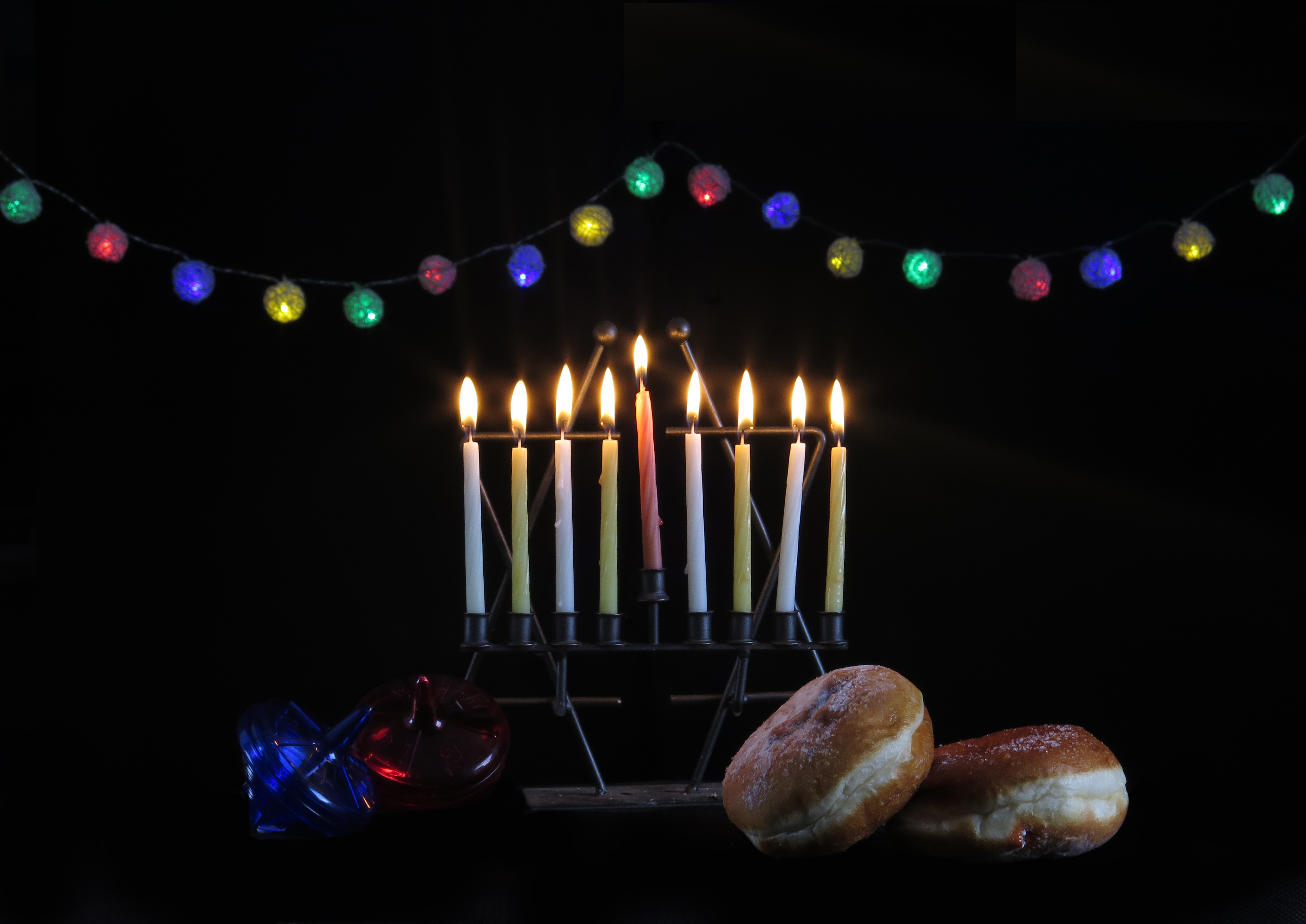 חנוכיה לחנוכה